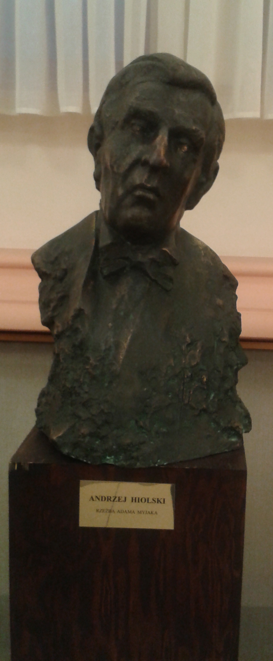 Andrzej Hiolski - polski tenor